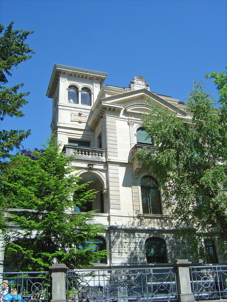 Die "Villa dem Schönen" am Parkring in Zürich, Sitz des Liceo Artistico, eines italienisch-schweizerischen Kunstgymnasiums.